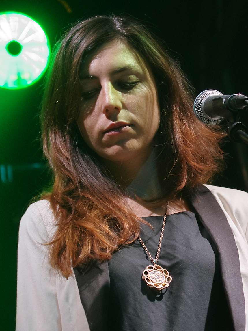 Julia Holter mit Begleitband auf dem Haldern Pop Festival 2013.